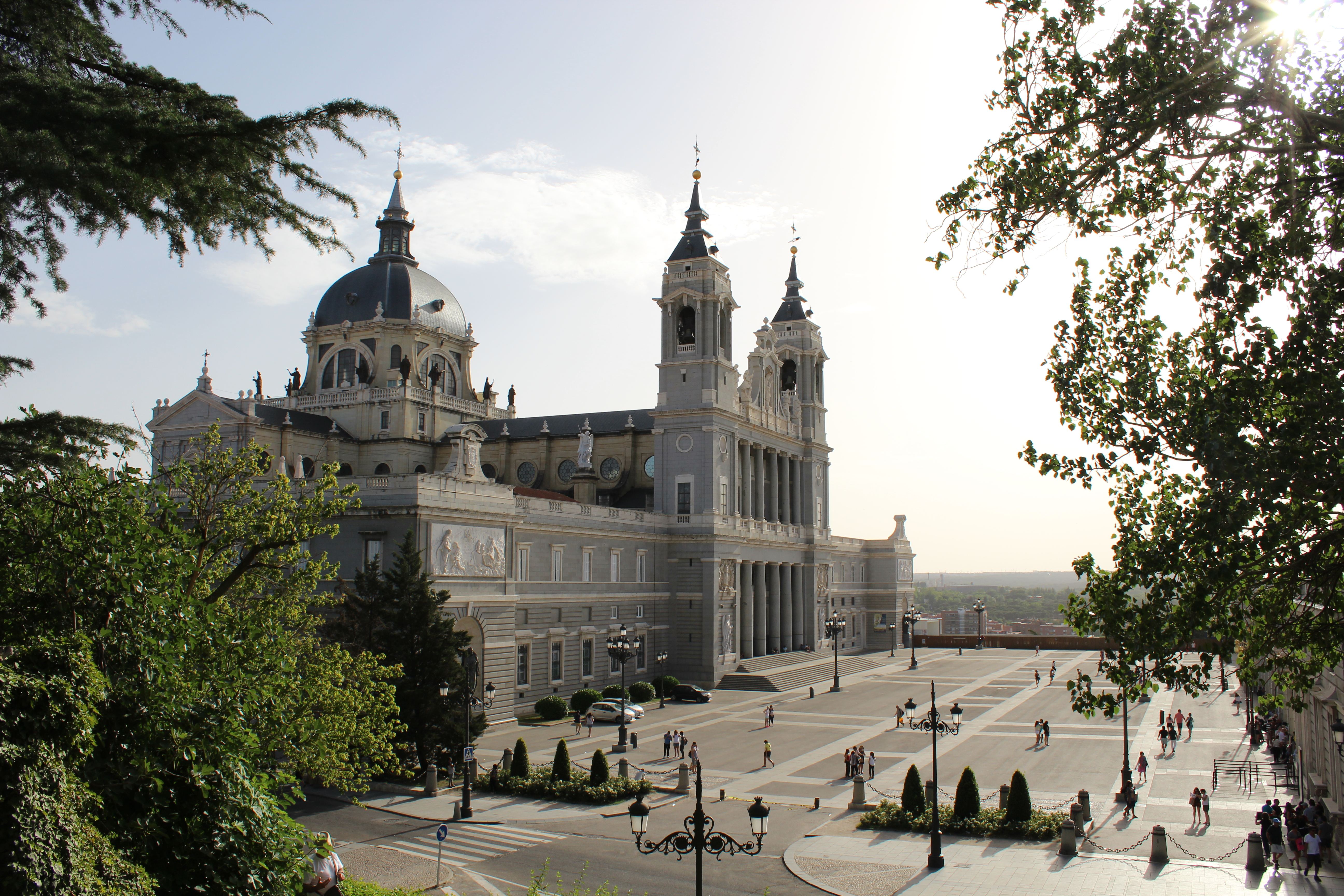 Plaza de la Armería, Madrid.